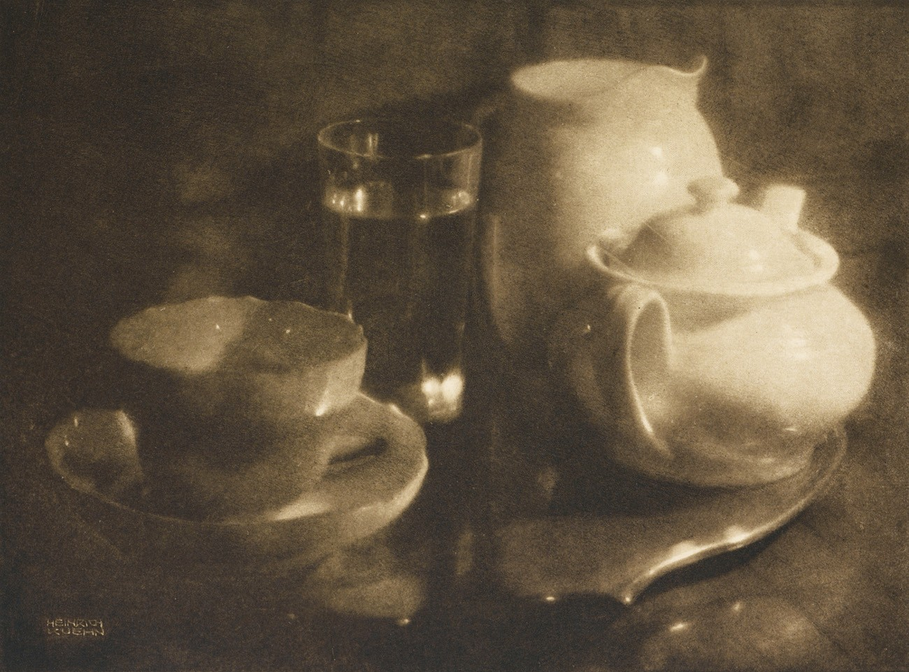 Photogravure; Photographische Rundschau 1908; Atelier Otto Felsing (Berlin) Abmasse: 13.1 x 17.7 cm: January: Heft I Tafel I